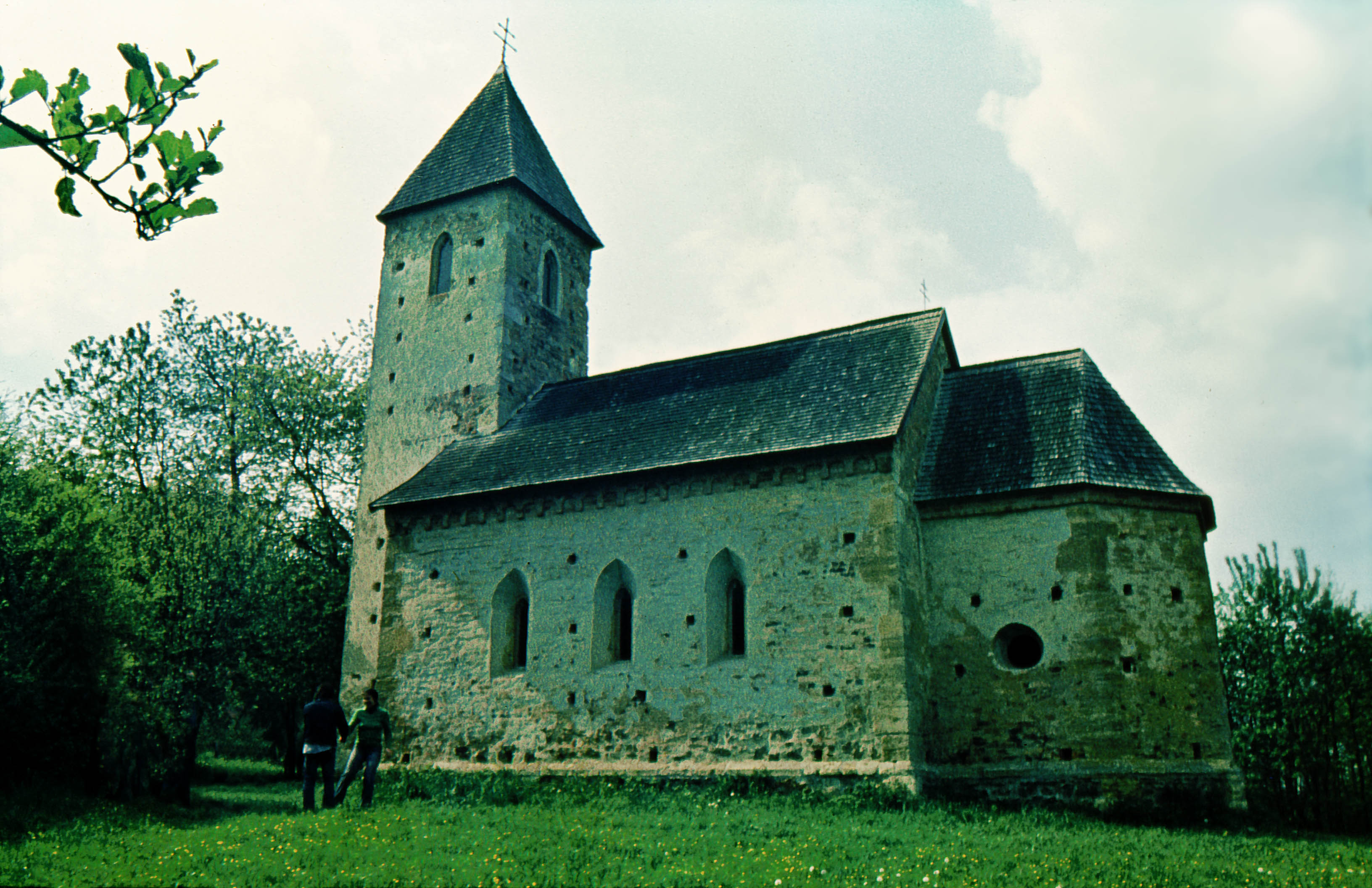 A veleméri román kori templom restaurálás közben, a fal kiszárítására szolgáló szellőzőnyílásokkal (Vas megye, Magyarország)